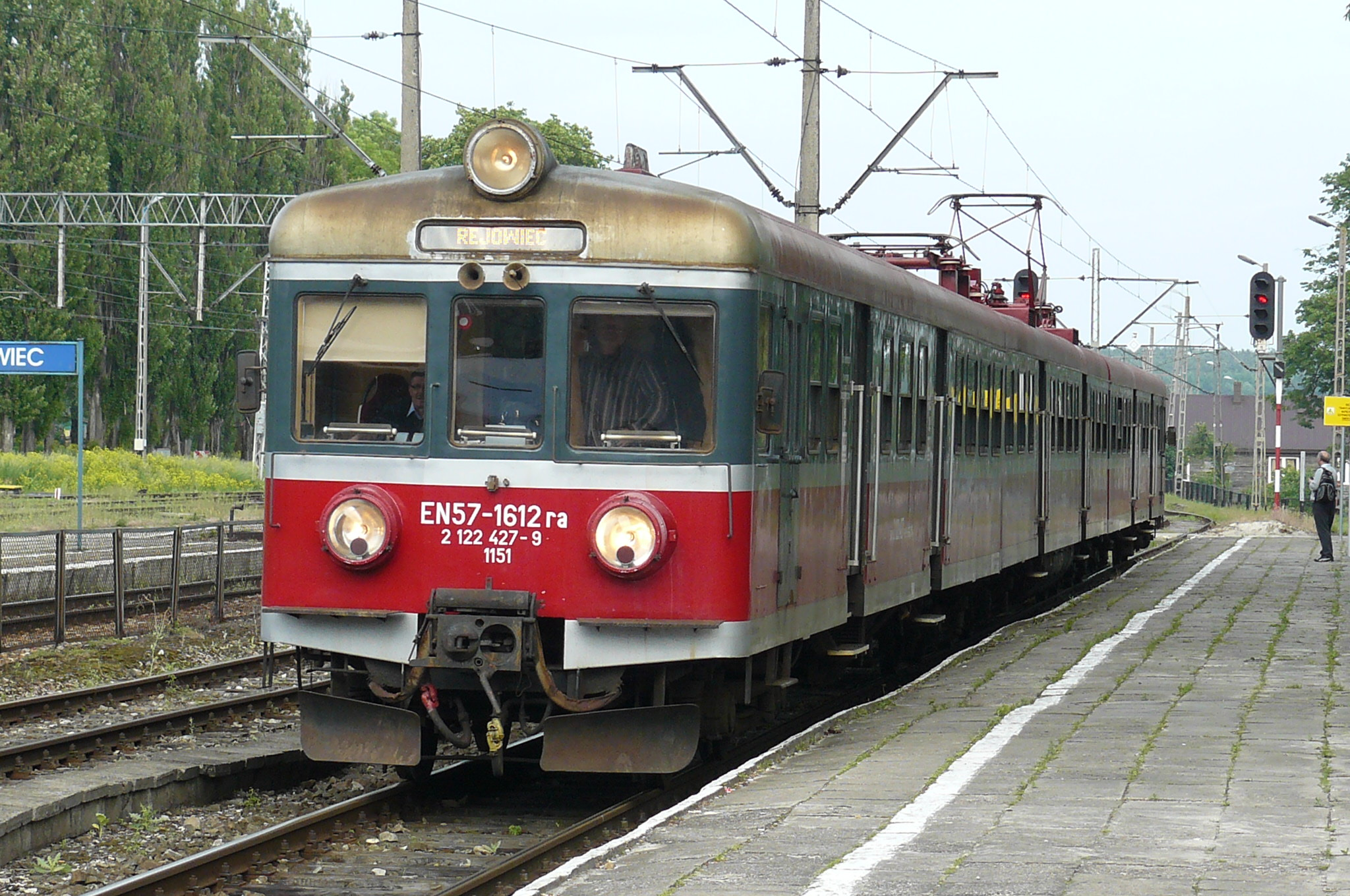 Rejowiec. EN57-1612.